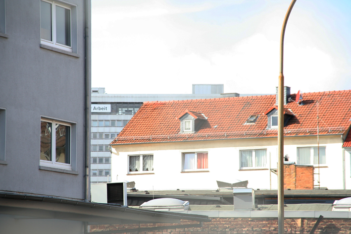 Blick über die Dächer auf das Gebäude des Arbeitsamtes im Grünen Weg